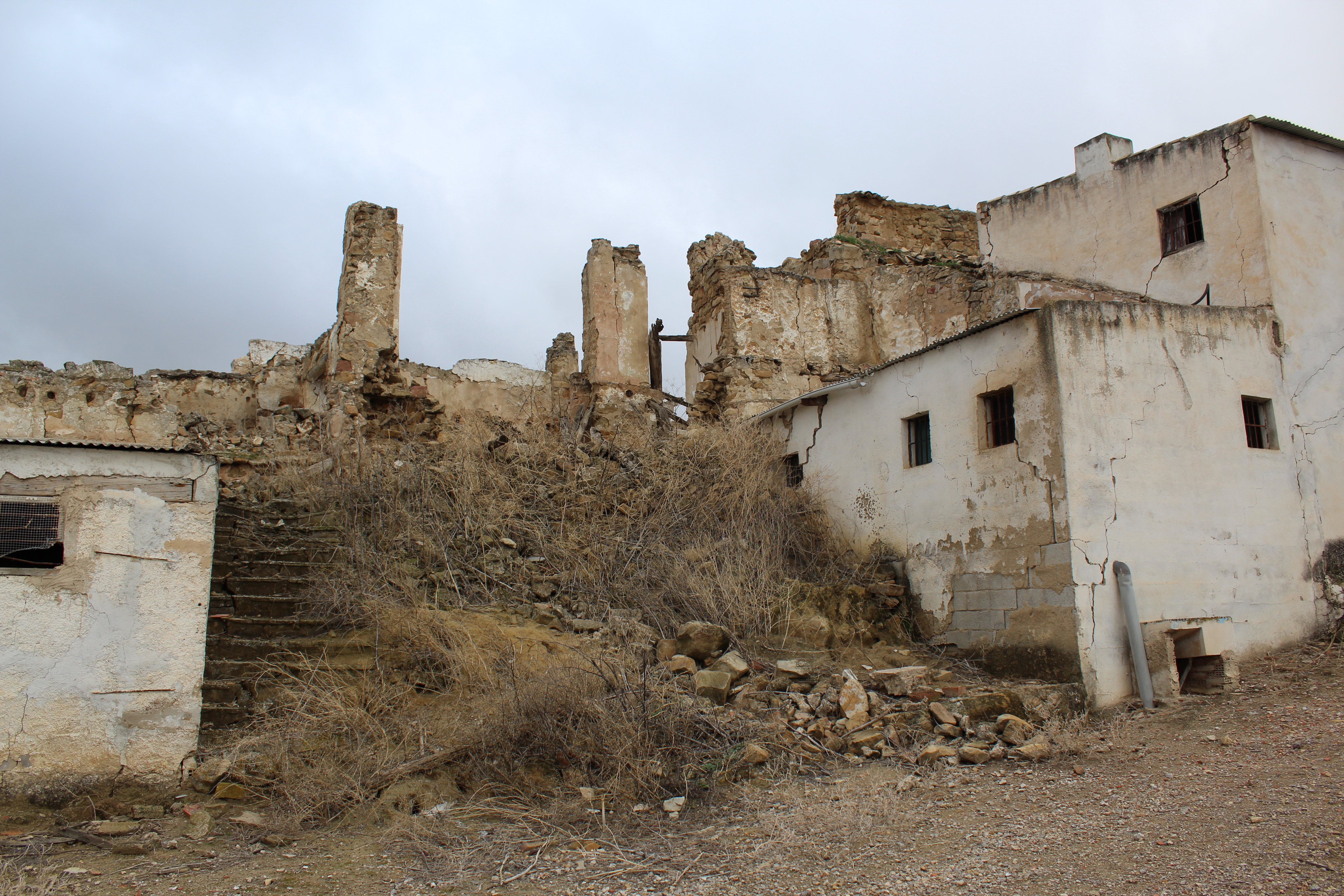 Vista parcial del cortijo de Macarena.